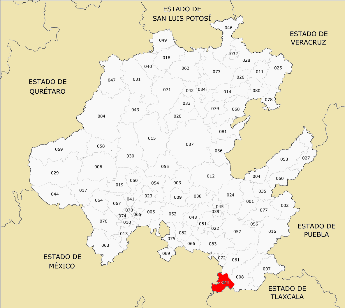 Municipios de Hidalgo